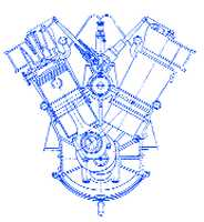 N-2 diesel by Ludwig Martens